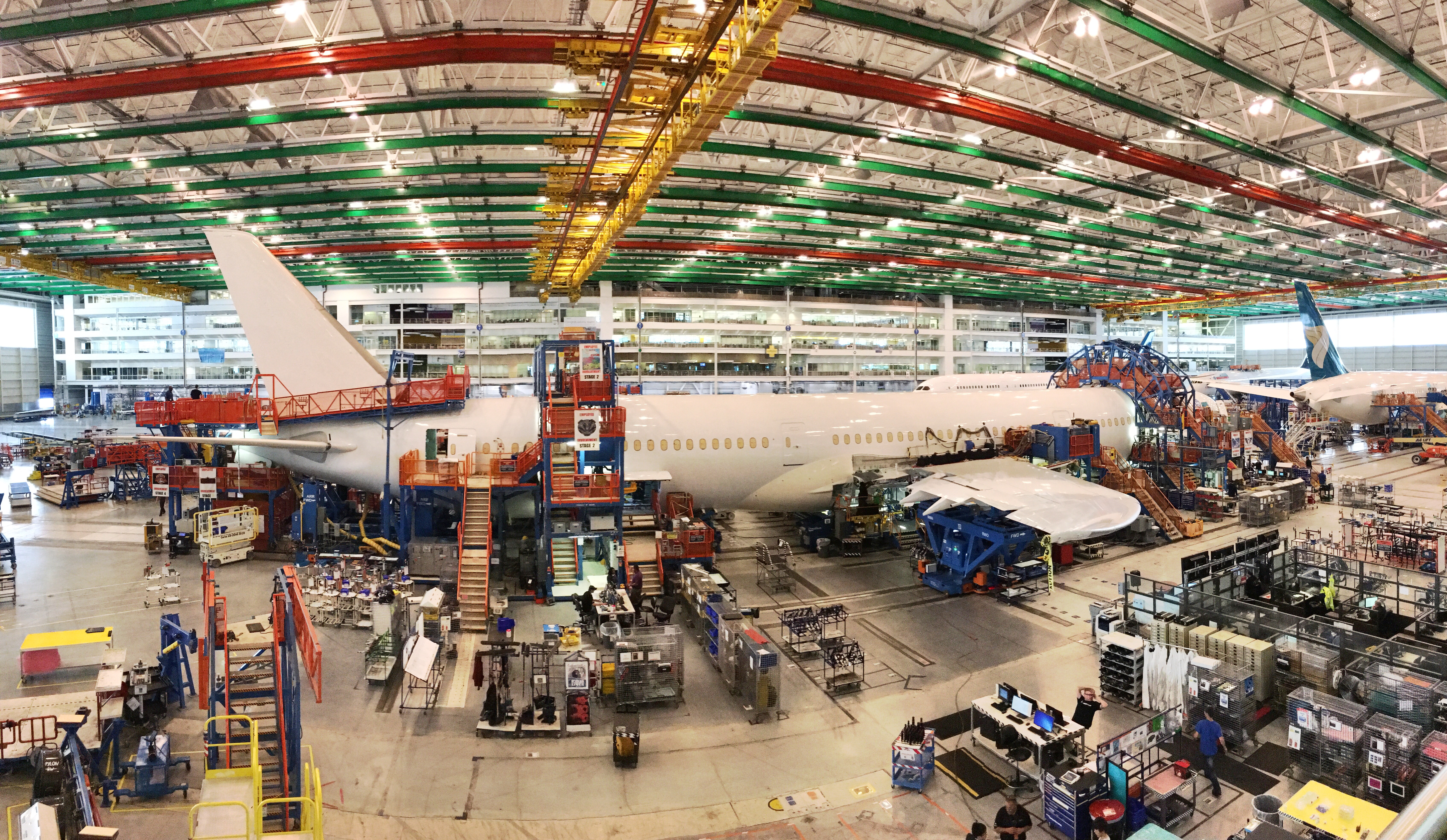 Final assembly of the 2nd 787-10 / Окончательная сборка 2-го 787-10 / 第二次787-10的最终组装